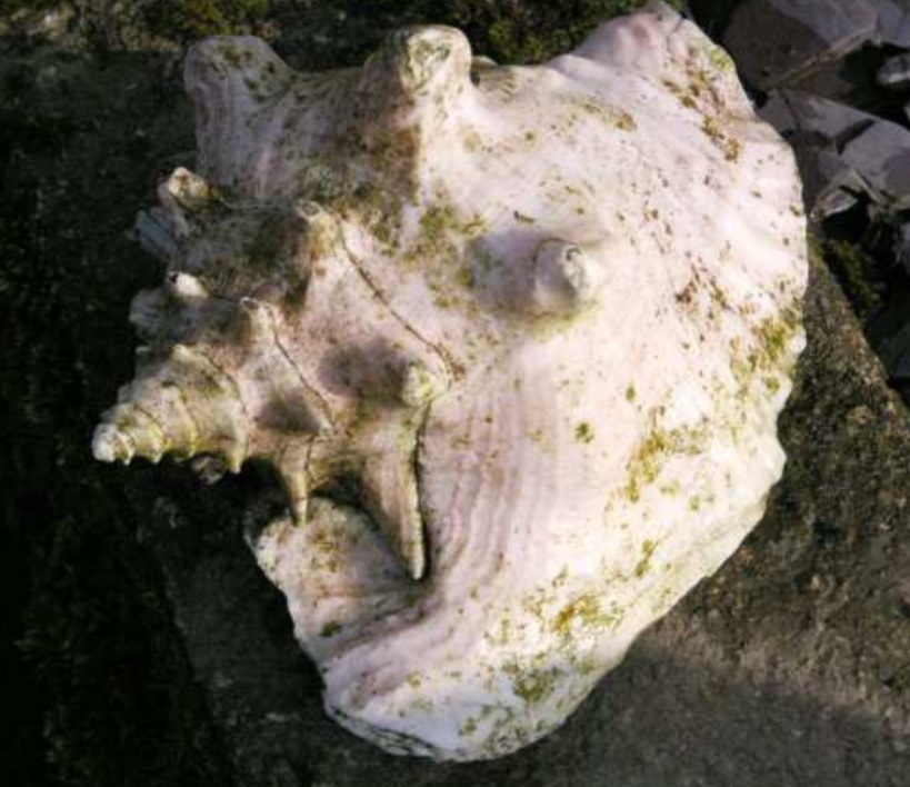 Cragen conch, addurn cyffredin mewn gerddi yng Nghymru, weithiau yn cael eu defnyddio ar ffermydd i alw gweithwyr o’r caeau.